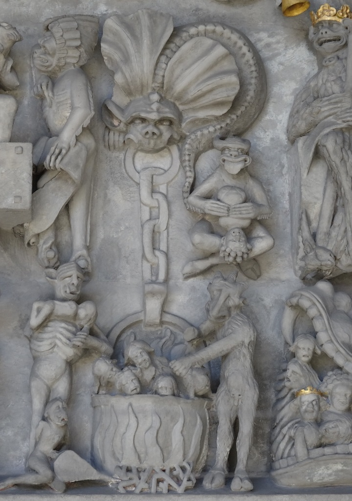 Cathédrale St-Nicolas de Fribourg (Suisse). Scènes de l'enfer sur le portail principal.